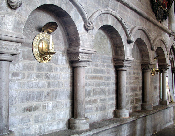 Blindarkad, Linköpings domkyrka. Sweden.